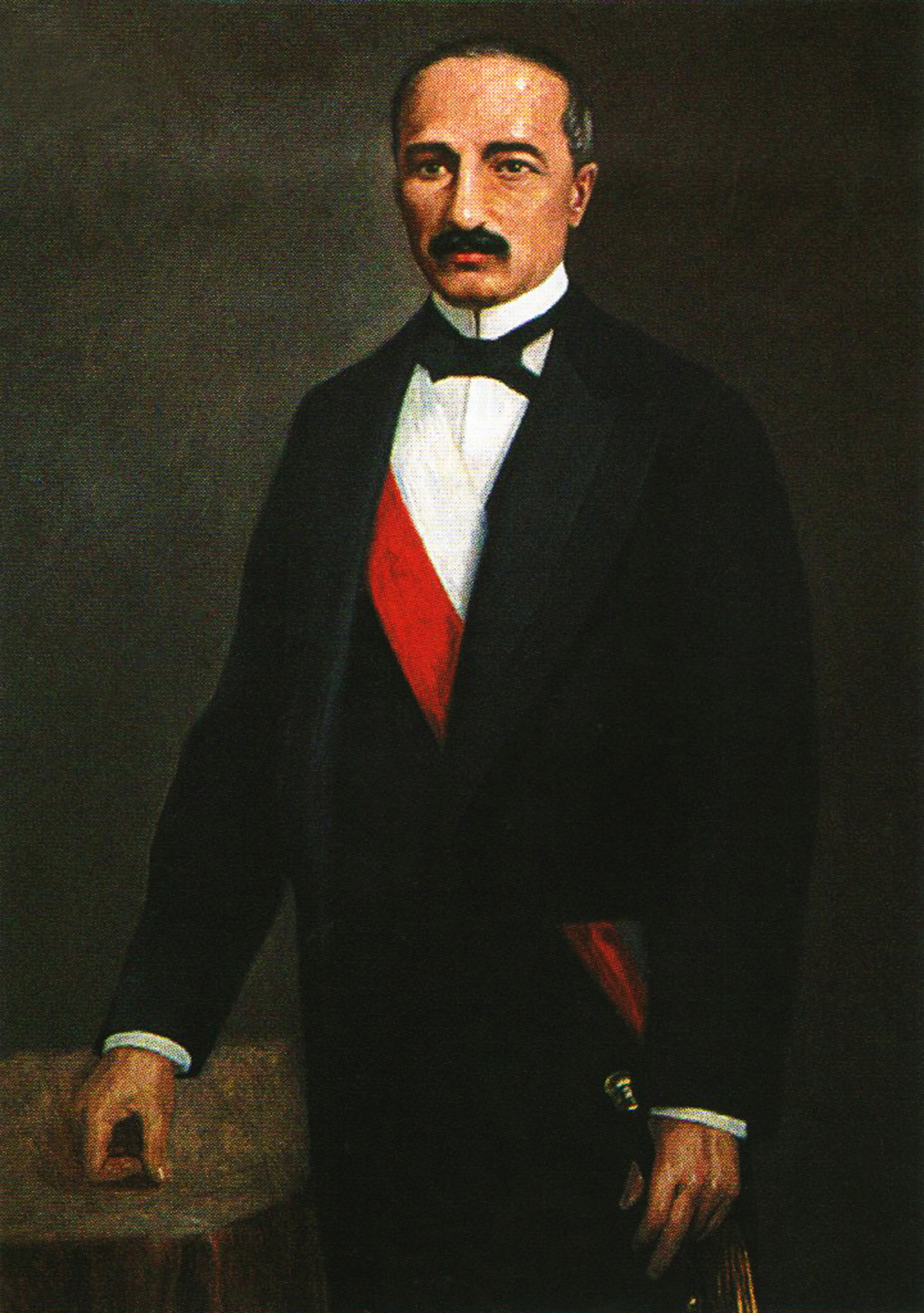 Retrato de Jose Balta en Biblioteca Militar de Lima